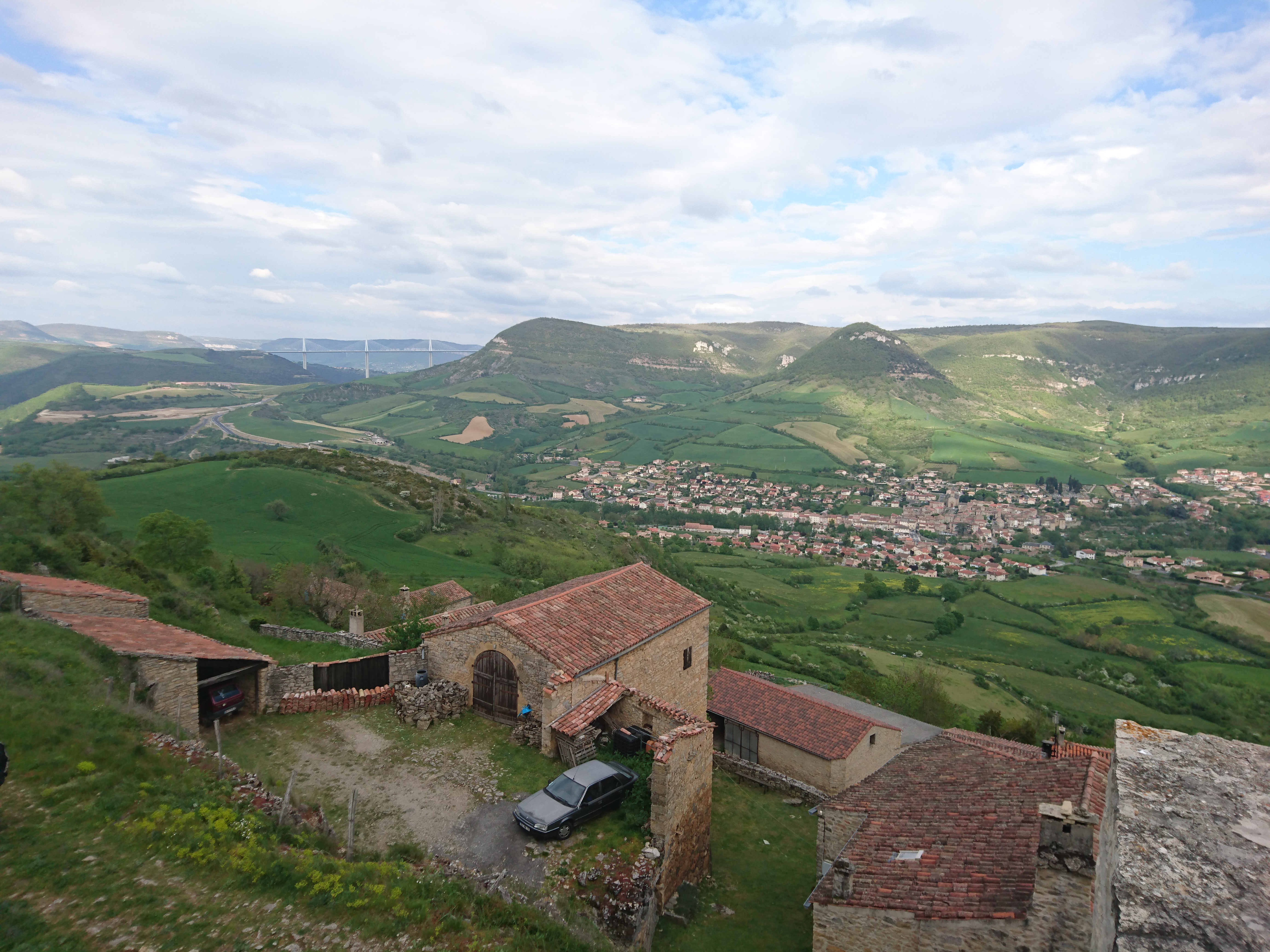 Vue sur Saint-Georges de Luzençon depuis le belvédère du hameau de Luzençon situé à 580 mètres d'altitude. En arrière-plan à gauche le viaduc de Millau.